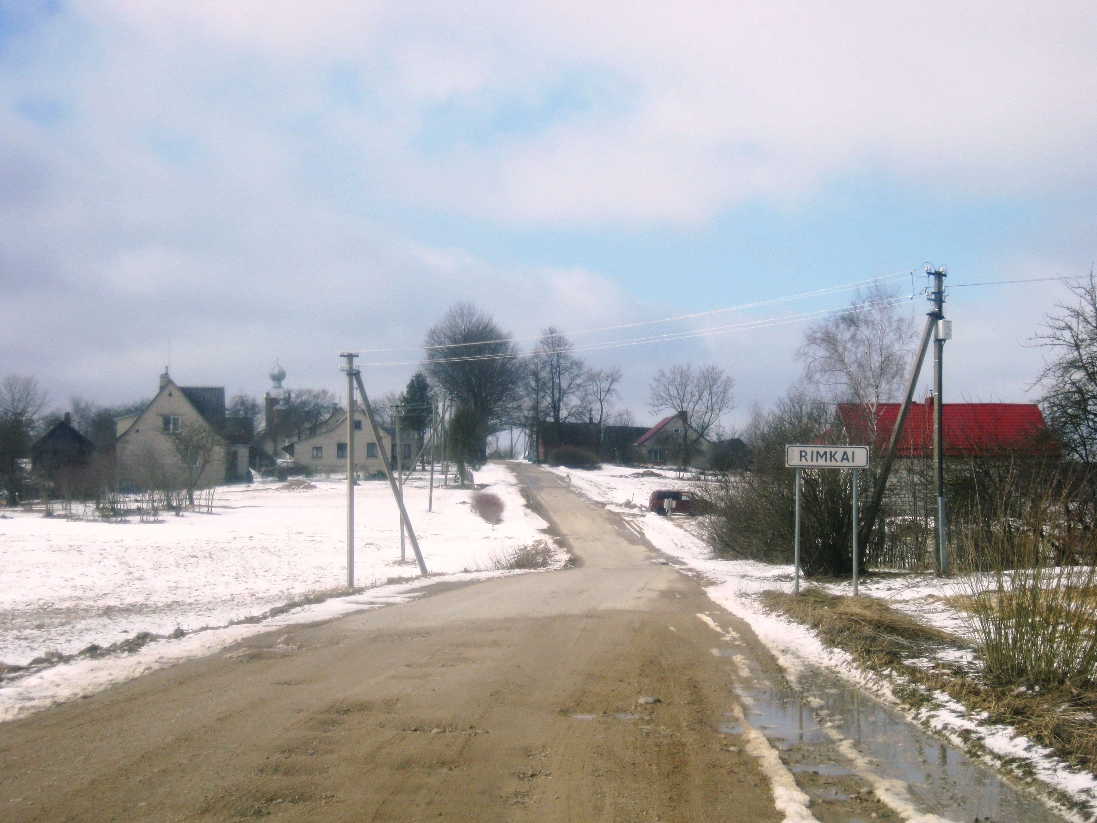 Rimkų kaimas, Jonavos rajonas